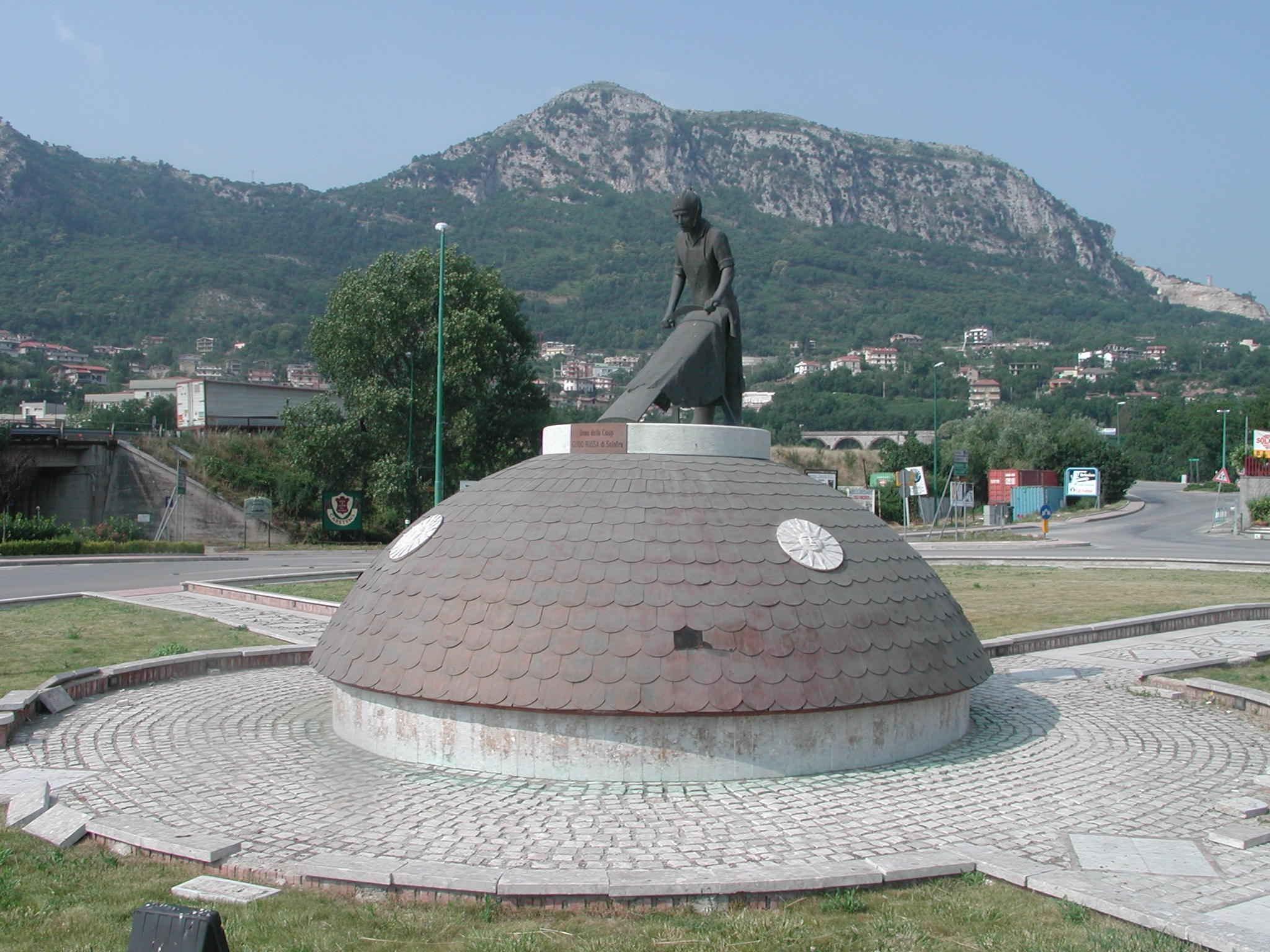 Santacroce sull'Arno (PI)